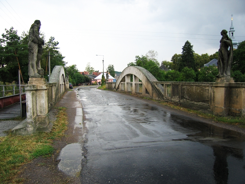 Silniční most se sochami Živlů (Křinec), přes Mrlinu, Křinec